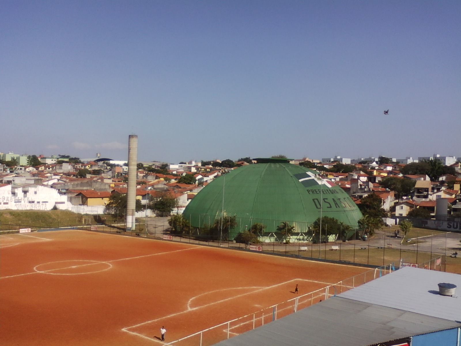 Vista do ginásio "Geodésico" a partir da av. dos Eucaliptos